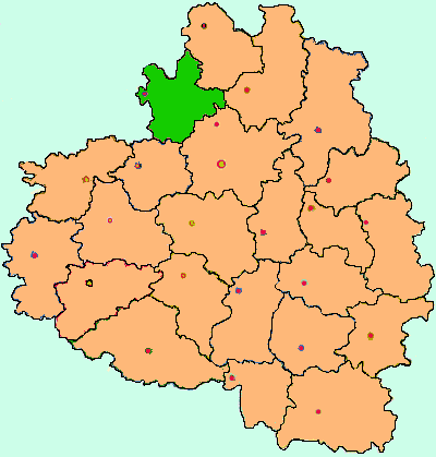 Tula Oblast map by Al Silonov Карта районов Тульской области